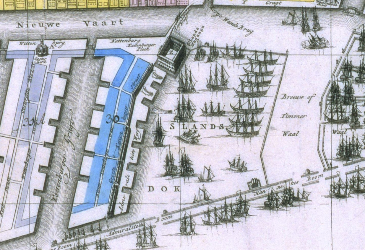 Plattegrond uit 1796 van 's Lands Werf, Zeemagazijn en Dok op Kattenburg in Amsterdam (noorden onder). Uitsnede uit de stadsplattegrond van uitgeverij Mortier Covens en Zoon.